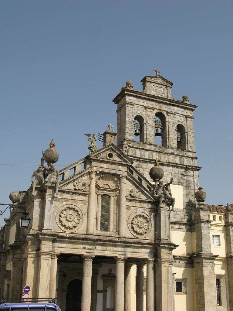 Renaissance façade of Graça Church in Evora, Portugal